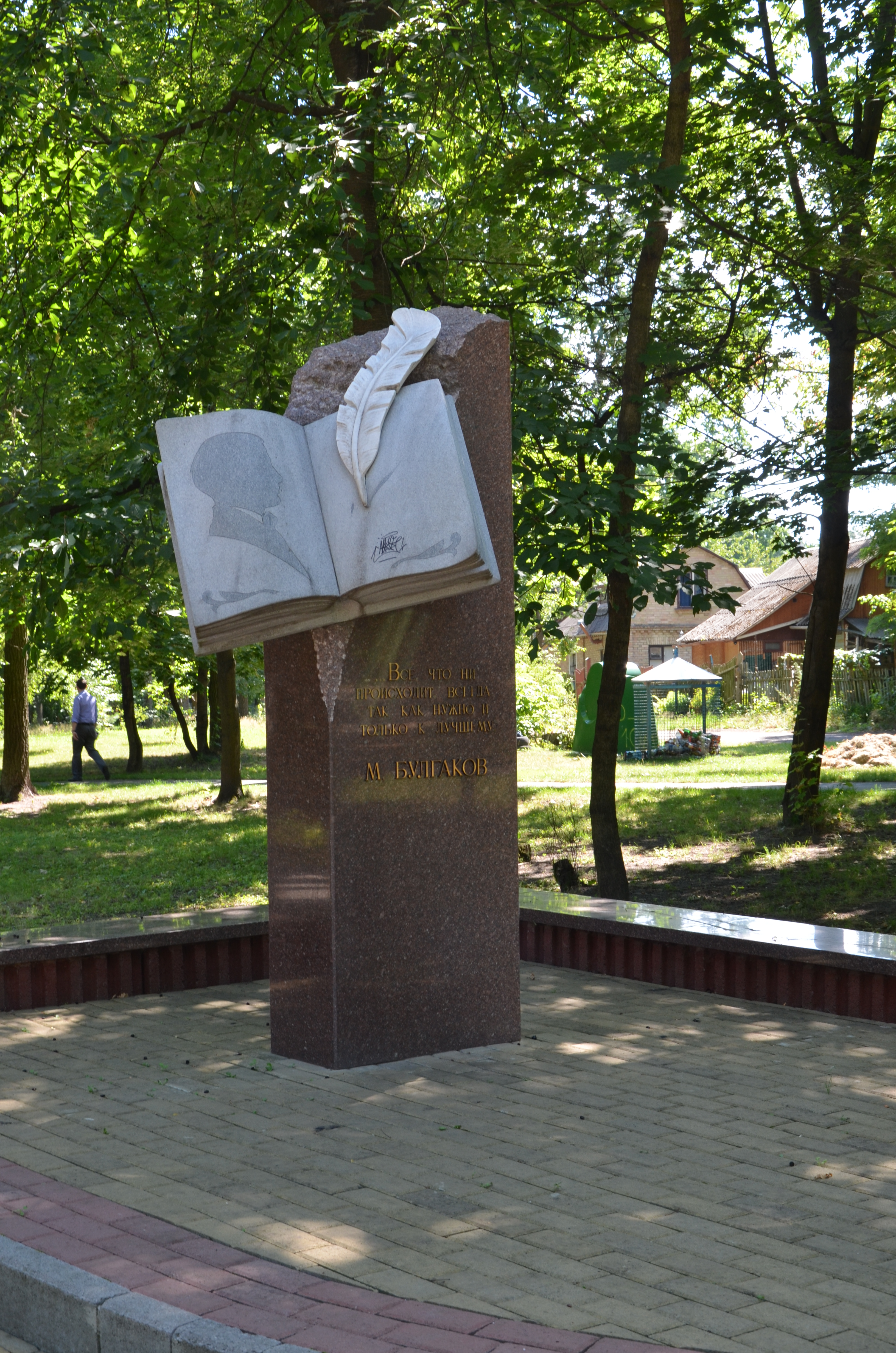 Садиба родини Булгакових (2,18 га), Буча